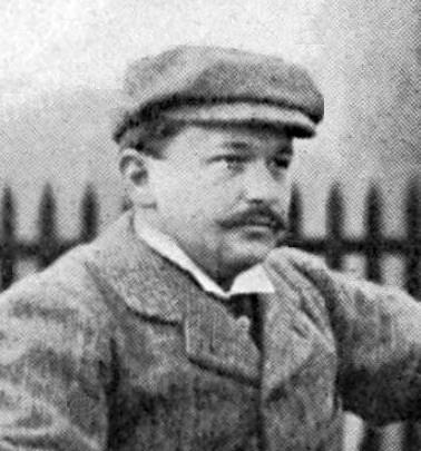 Paul Jamin, vainqueur de la catégorie motocycles à la première édition de la course de côte de Chanteloup, 27 novembre 1898)